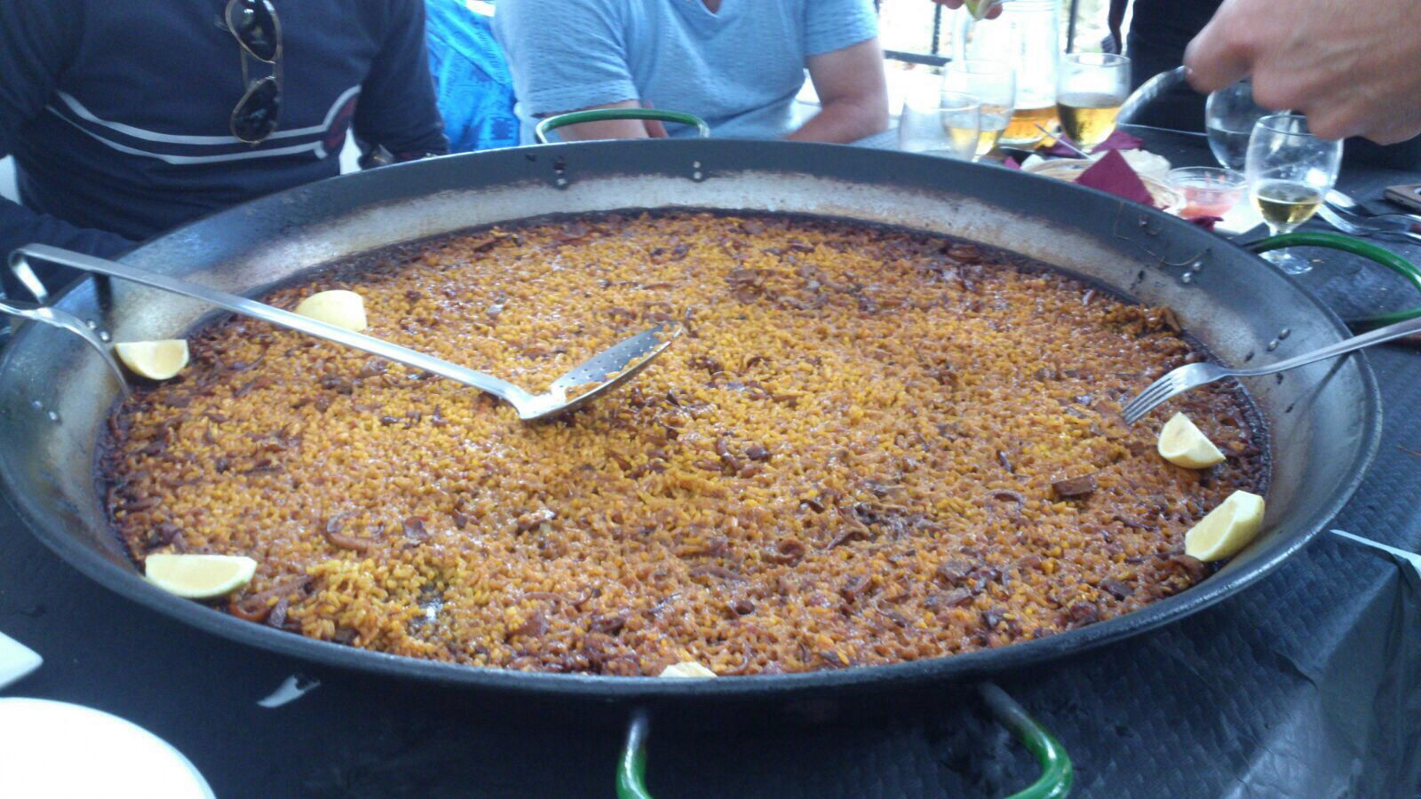 Paella d'arròs a banda.Celebrando con amigos